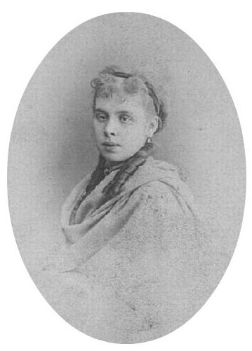 Дарья Константиновна Опочинина (1844—1870), в январе 1869 году во Флоренции сочеталась морганатическим браком с герцогом Евгением Лейхтенбергским, получила титул графини Богарне.